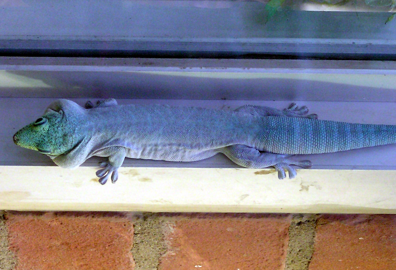 Standing’s day gecko Phelsuma standingi at Bristol Zoo, Bristol, England.